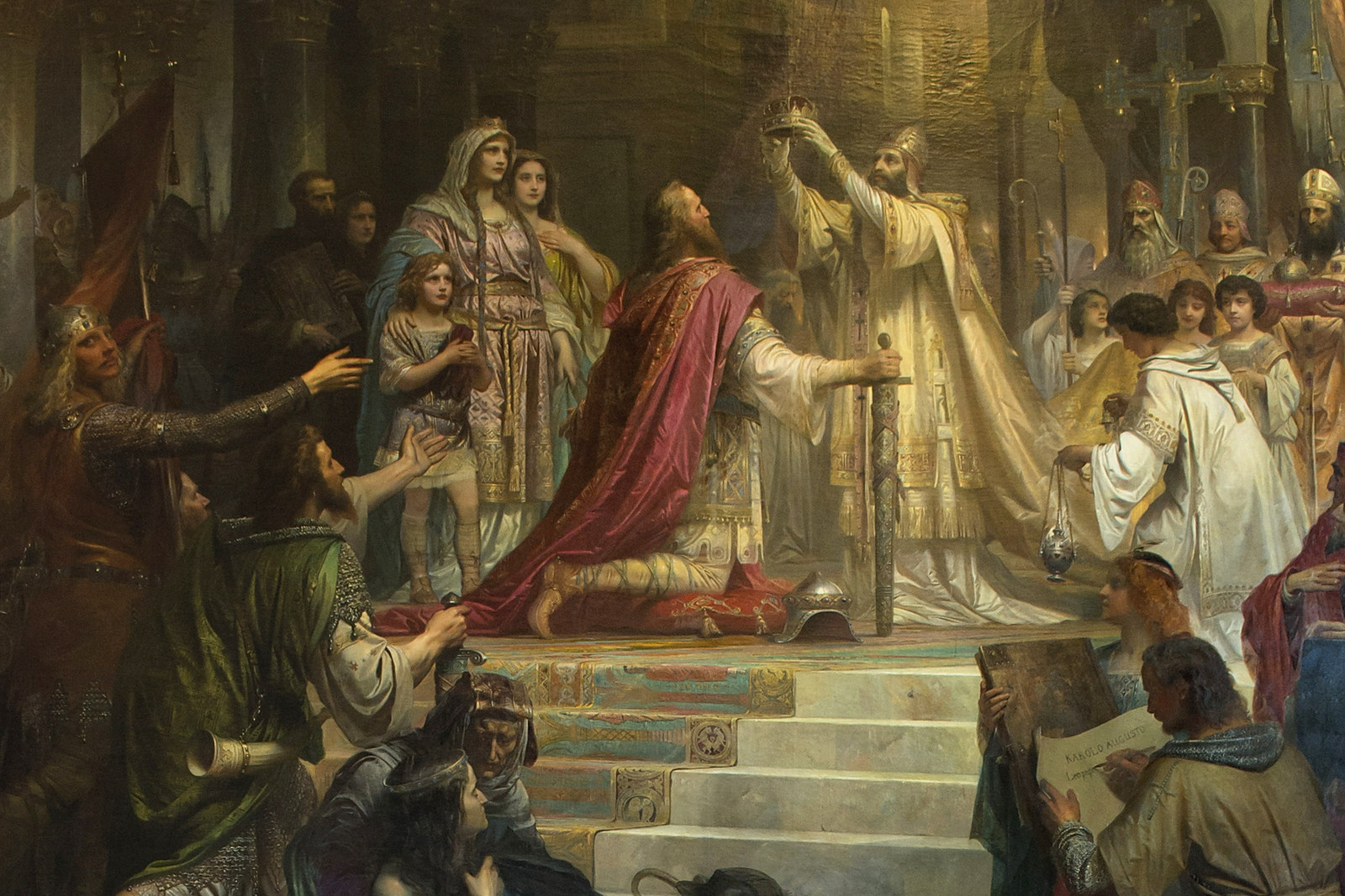 Die Kaiserkrönung Karls des Großen, Maximilianeum München